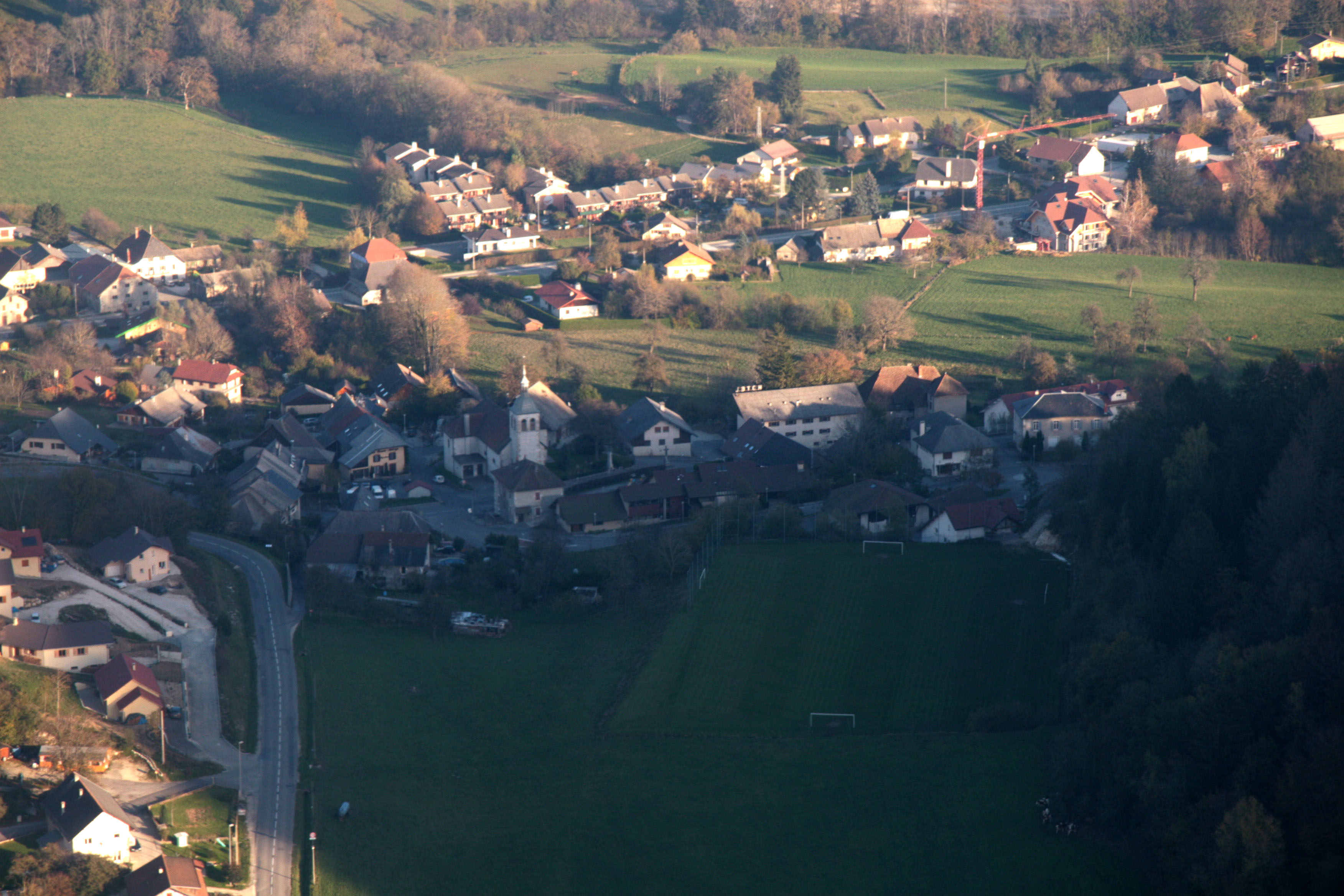 Vu aerienne du centre d'Allonzier-la-Caille